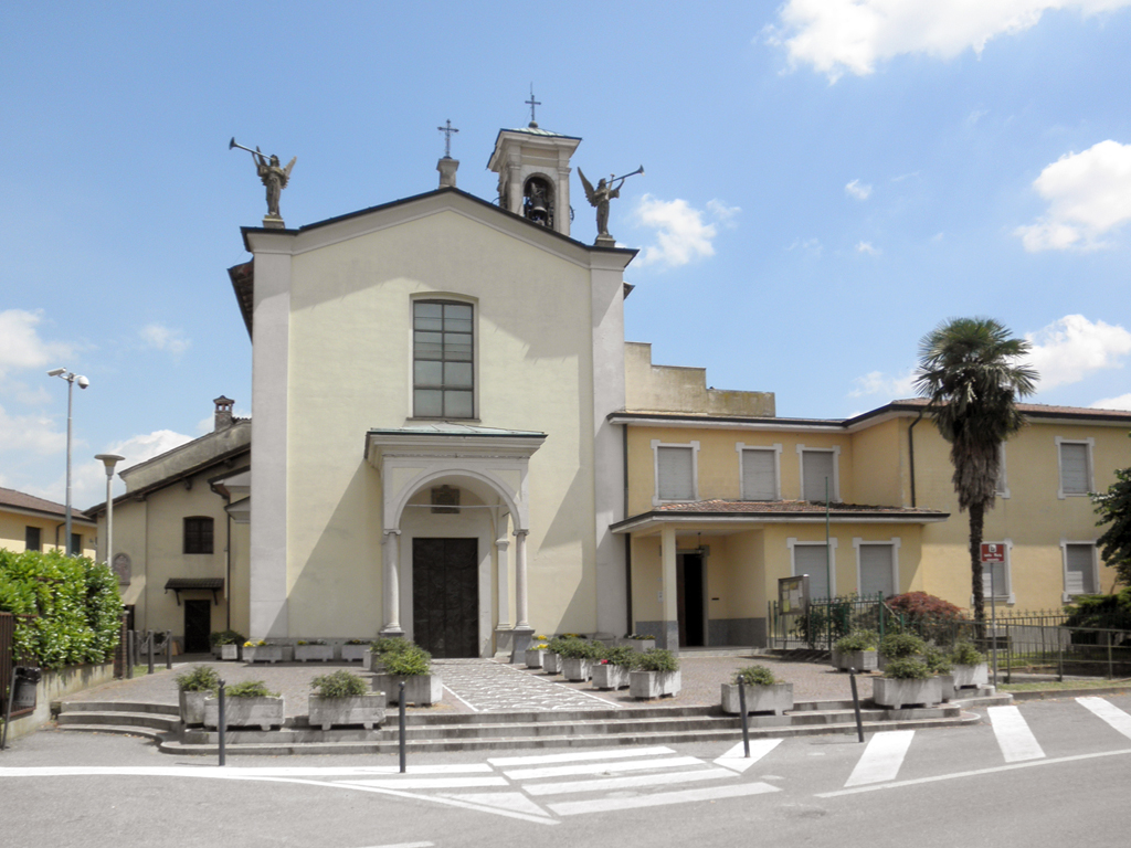 La chiesa parrocchiale della Natività della Beata Vergine Maria a Boffalora d'Adda